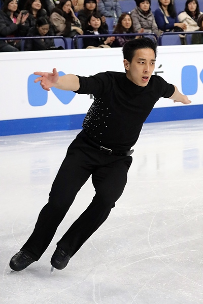 Джулиан Йи Чжи Цзе (Малайзия) на чемпионате мира 2017